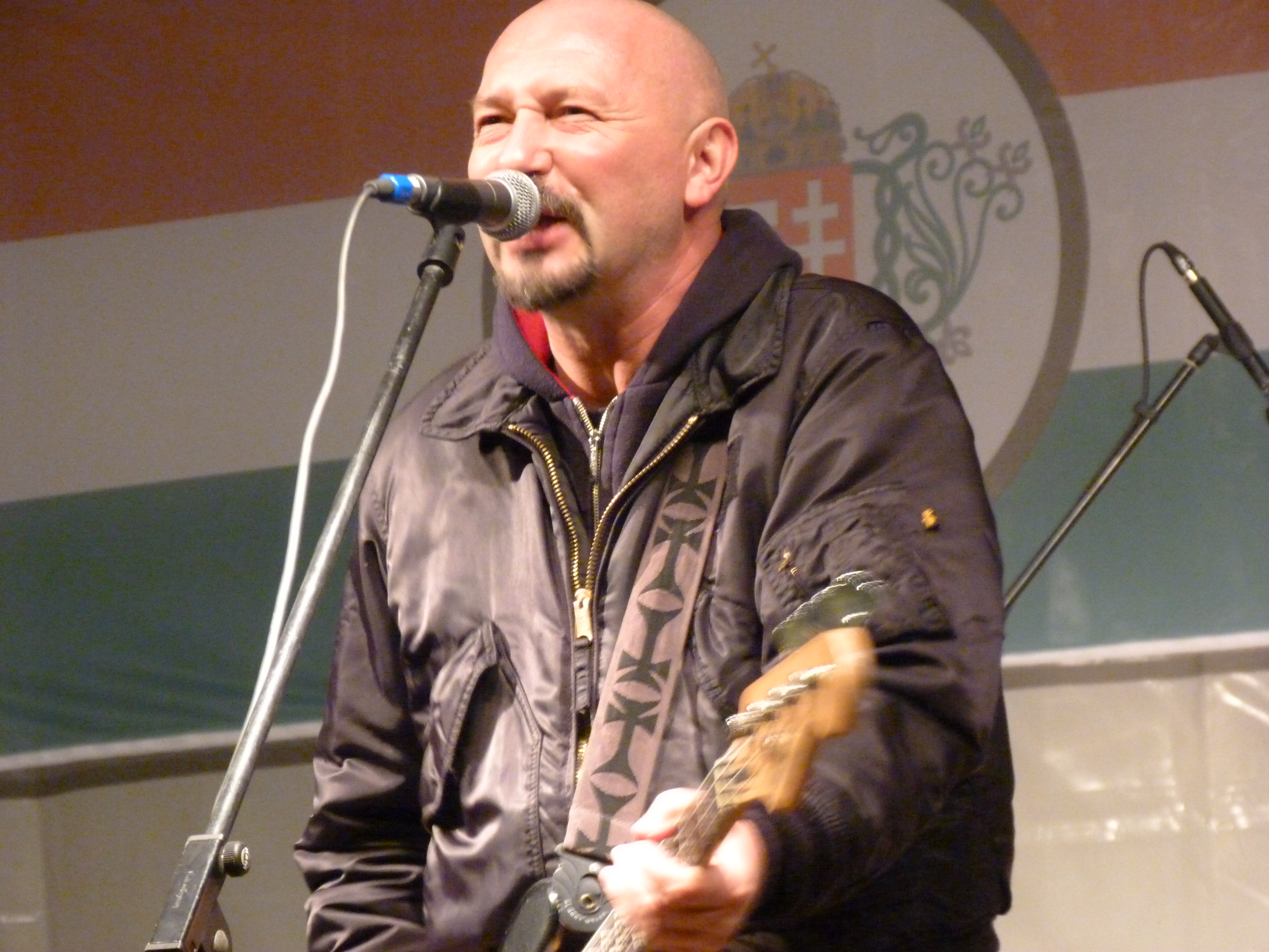 Petrás János, a Kárpátia együttes tagja.